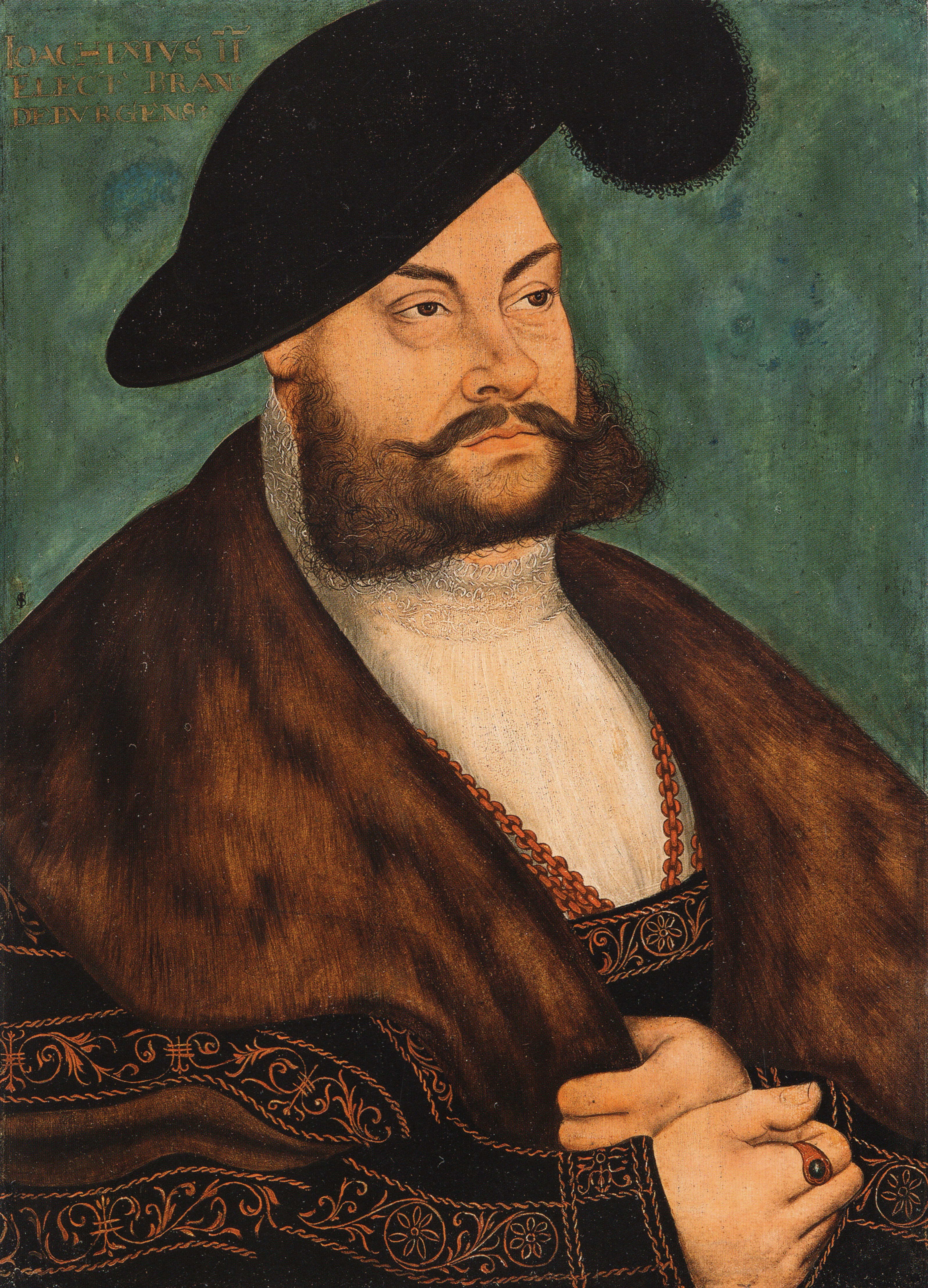 Portrait von Kurfürst Joachim II. von Brandenburg. Inschrift: IOACHIMVS II ELECT. BRANDEBVRGENS